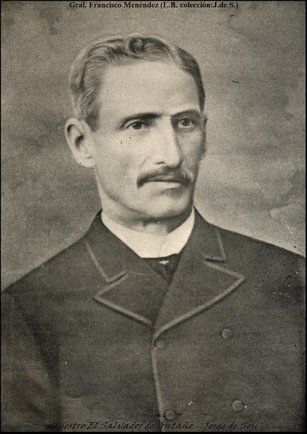 la revolución liberal de la de 1885 que alañó el dictador violento y líder progasivo gen. francisco meléndez.